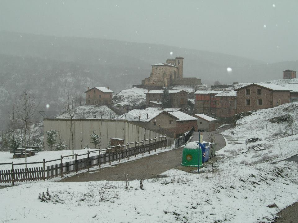 Pinillos